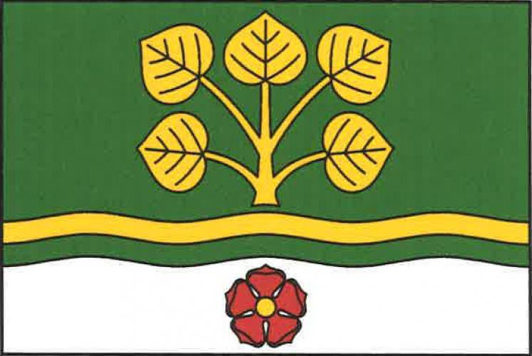 vlajka Nebahovy